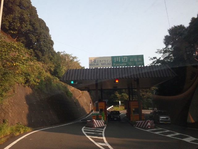 鹿児島県にある川辺ICの画像